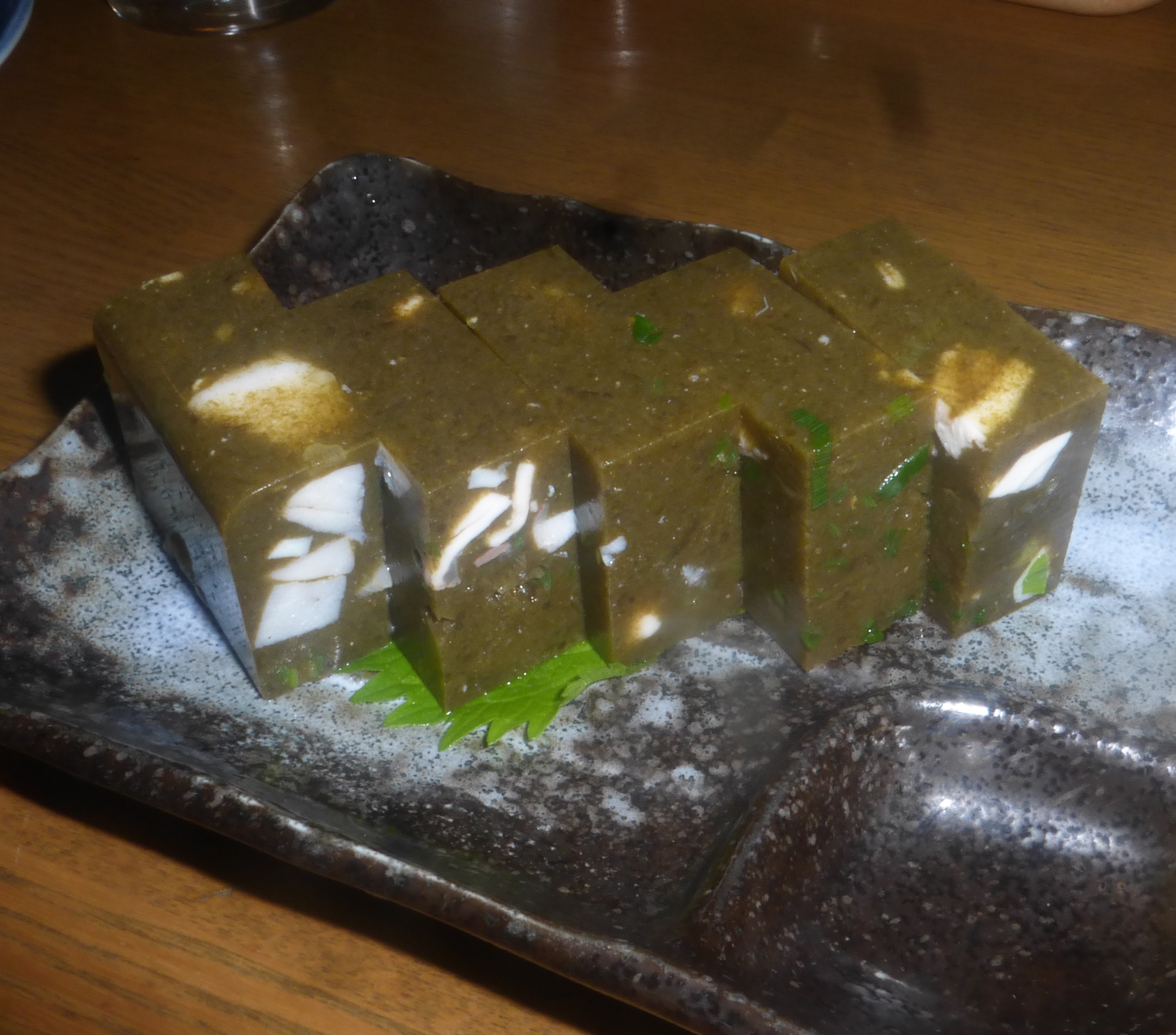 八丈島の「ぶど」 (Hachijojima's "budo")